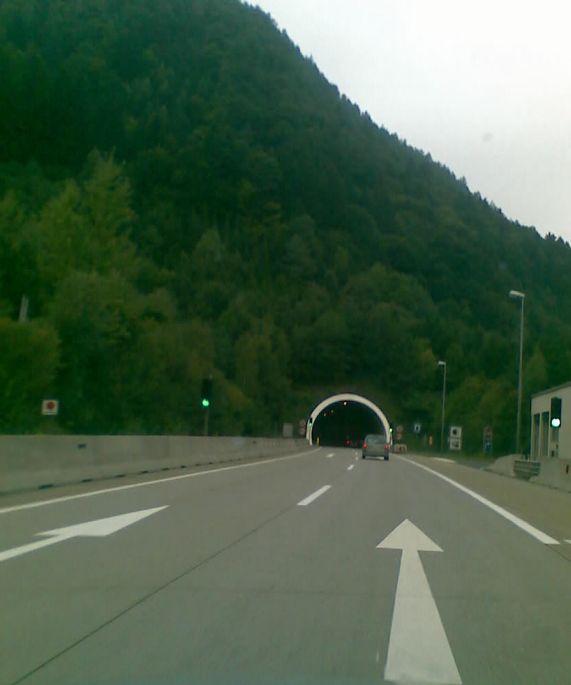 Oswaldibergtunnel